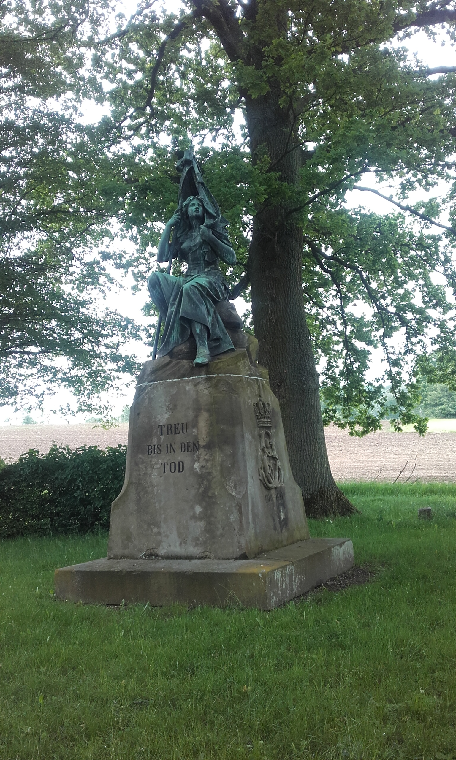 Bas-Rhin, Morsbronn-lès-Bains, route de Griesbach. Le mémorial aux morts du 6e Régiment d’Infanterie de Thuringe, de Johannes Schilling a été érigé en 1896. La mention « 1870-1895 » sur le socle rappelle commémore les 25 ans d'un épisode de la bataille du 6 août 1870. Sur les banderolles ceignant la tête de la sculpture on peut y lire le nom des mécènes qui lont financé sa réalisation : la Princesse royale Victoria de Prusse, la Princesse royale de Grande-Bretagne et celui de la Duchesse de Saxe. L’inscription sur la face avant « Treu bis in den Tod » (fidèles jusque dans la mort), illustre le sacrifice des soldats thuringeois.